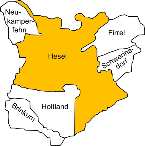 Lage der Gemeinde Hesel in der Samtgemeinde Hesel im Landkreis Leer (Ostfriesland), Niedersachsen, Deutschland.